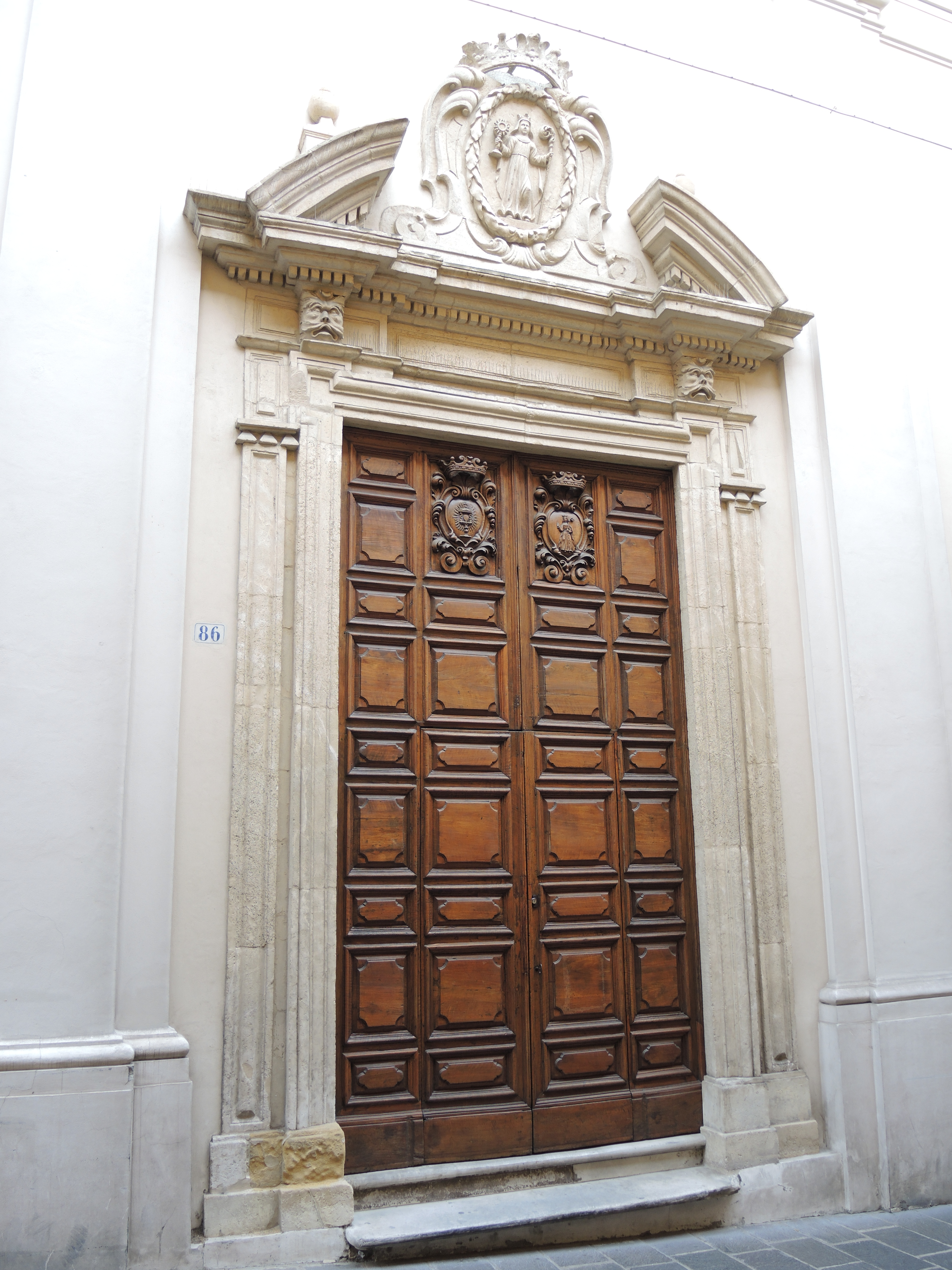 Chieti: Chiesa di Santa Chiara